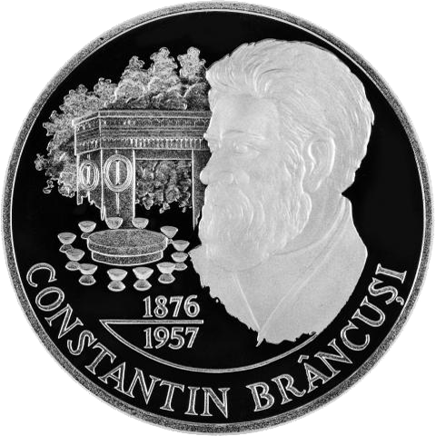 Реверс памятной монеты "125 лет со дня рождения Константина Бранкузи"